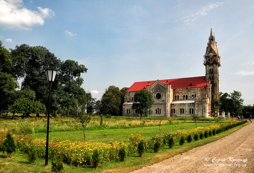 Монастир та костел св. Герарда